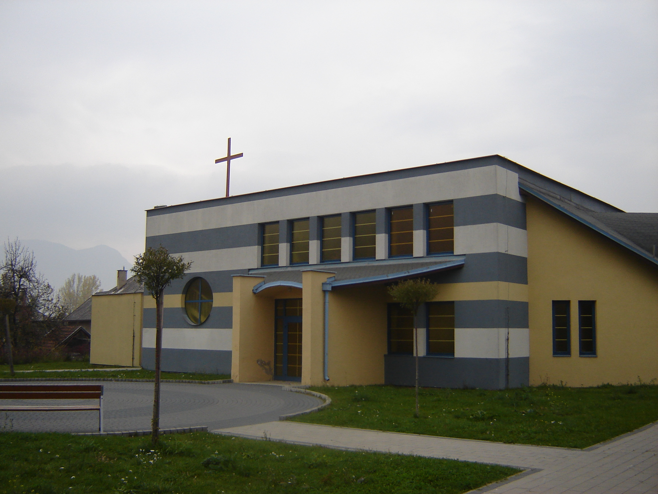 Kostol sv. Petra a Pavla